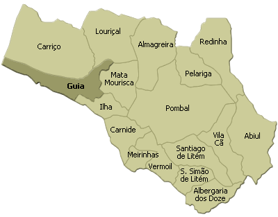 localisation de guia dans la freguesia de pombal